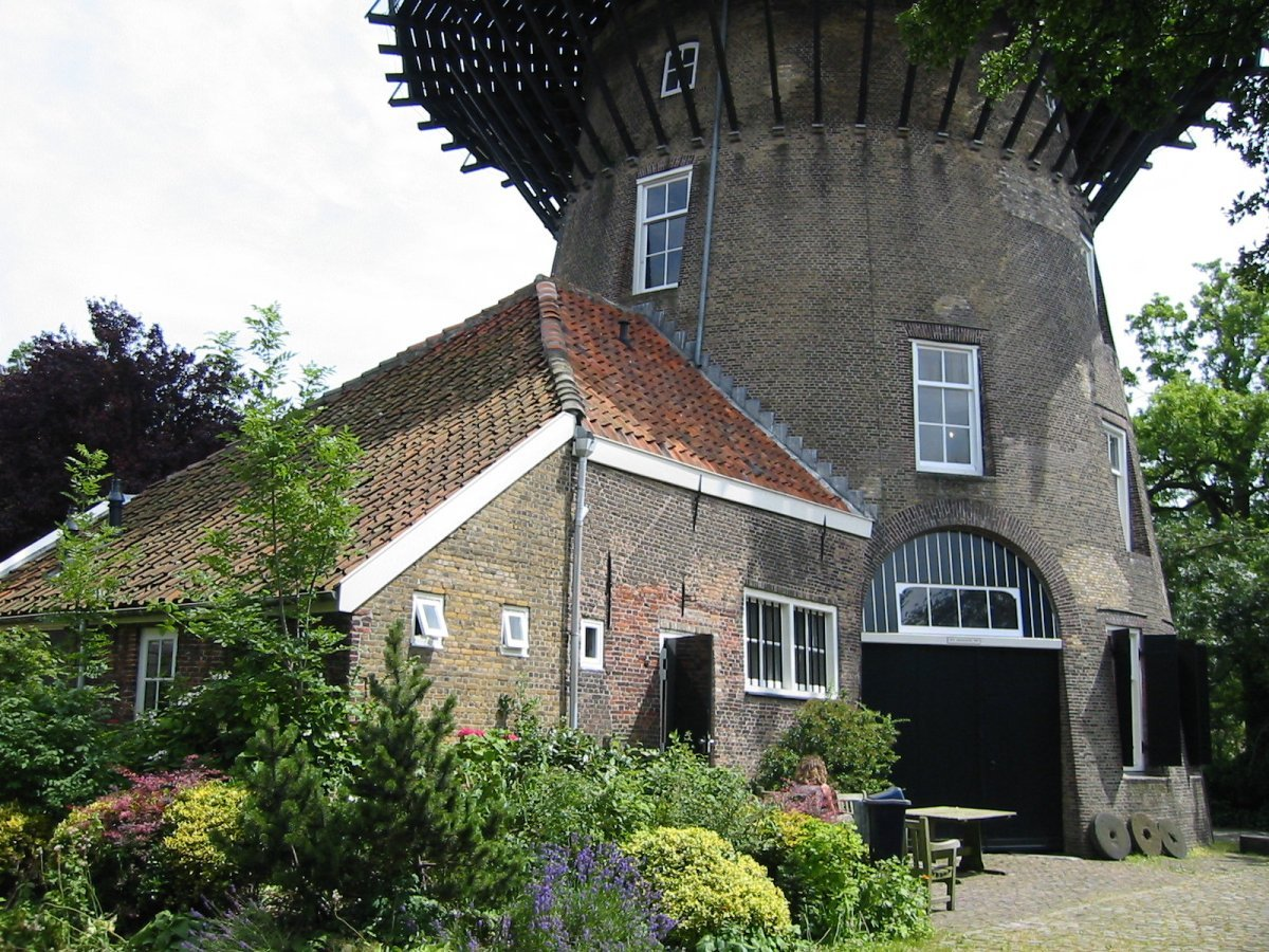 De Valk/ Ten-Bruggencatenummer: 00069: Close-up van ronde stenen stellingmolen met aanbouw (opmerking: Foto gemaakt in het kader van het project Actualisering Monumentenregister (AMR).)